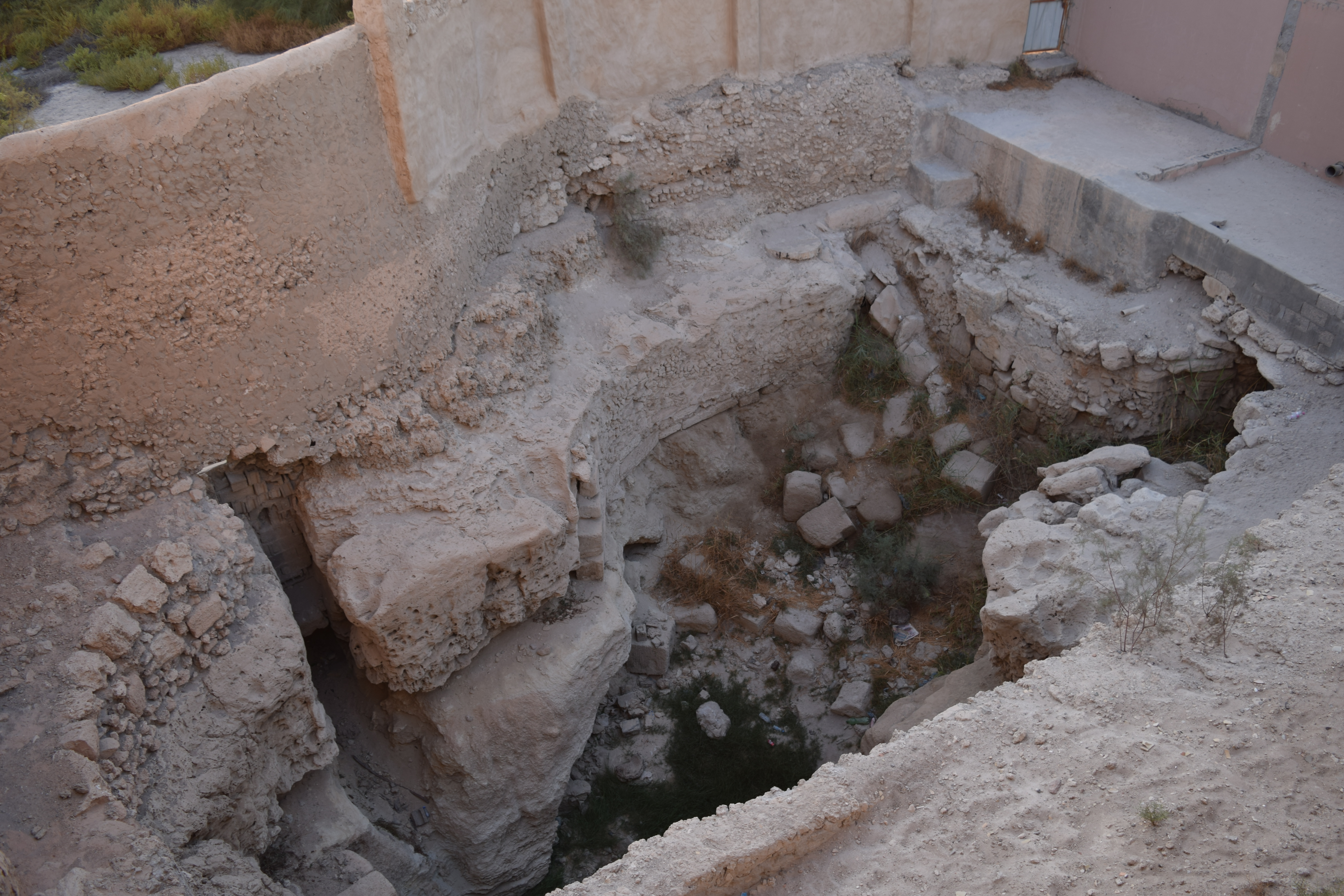 صورة توضح نضوب وعدم الاهتمام بعين العودة